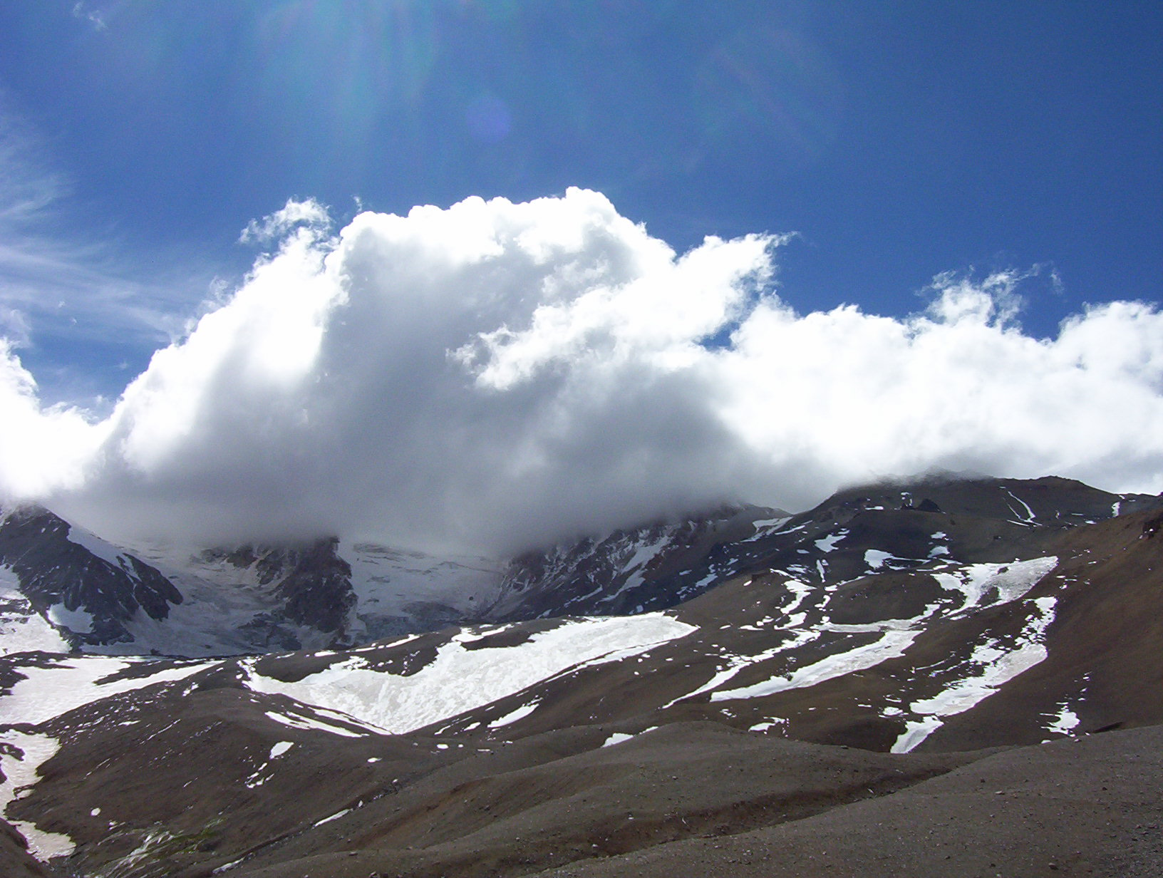 Volcán Domuyo desde los 3200 metros de altura.